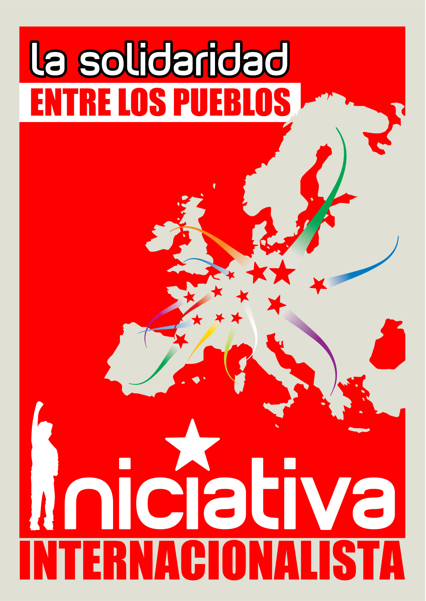 Cartel de la organización política española Iniciativa Internacionalista - La Solidaridad entre los Pueblos.